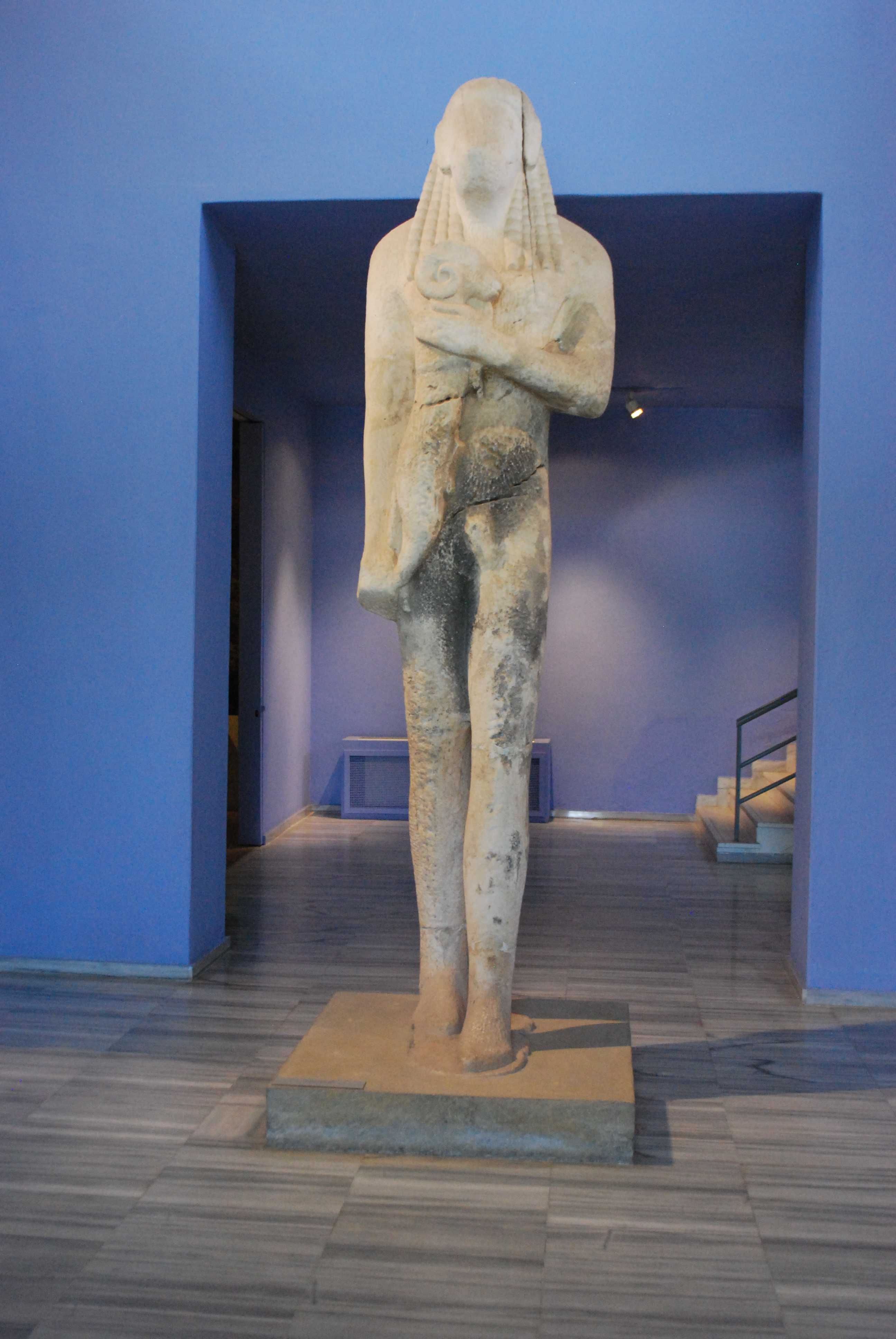 Vue du Musée archéologique de Thasos, à Limenas, dans l'île de Thasos (Grèce).